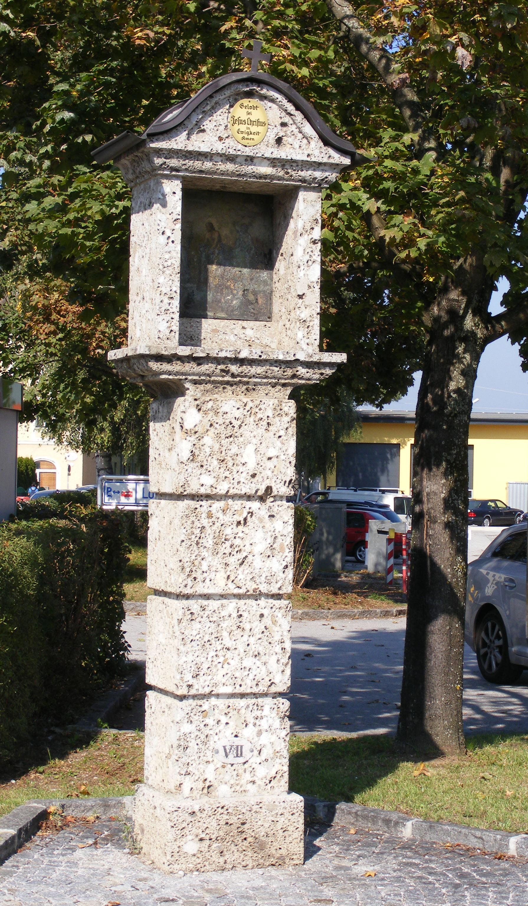 Geheimnissäule VII, Bildstock von 1705